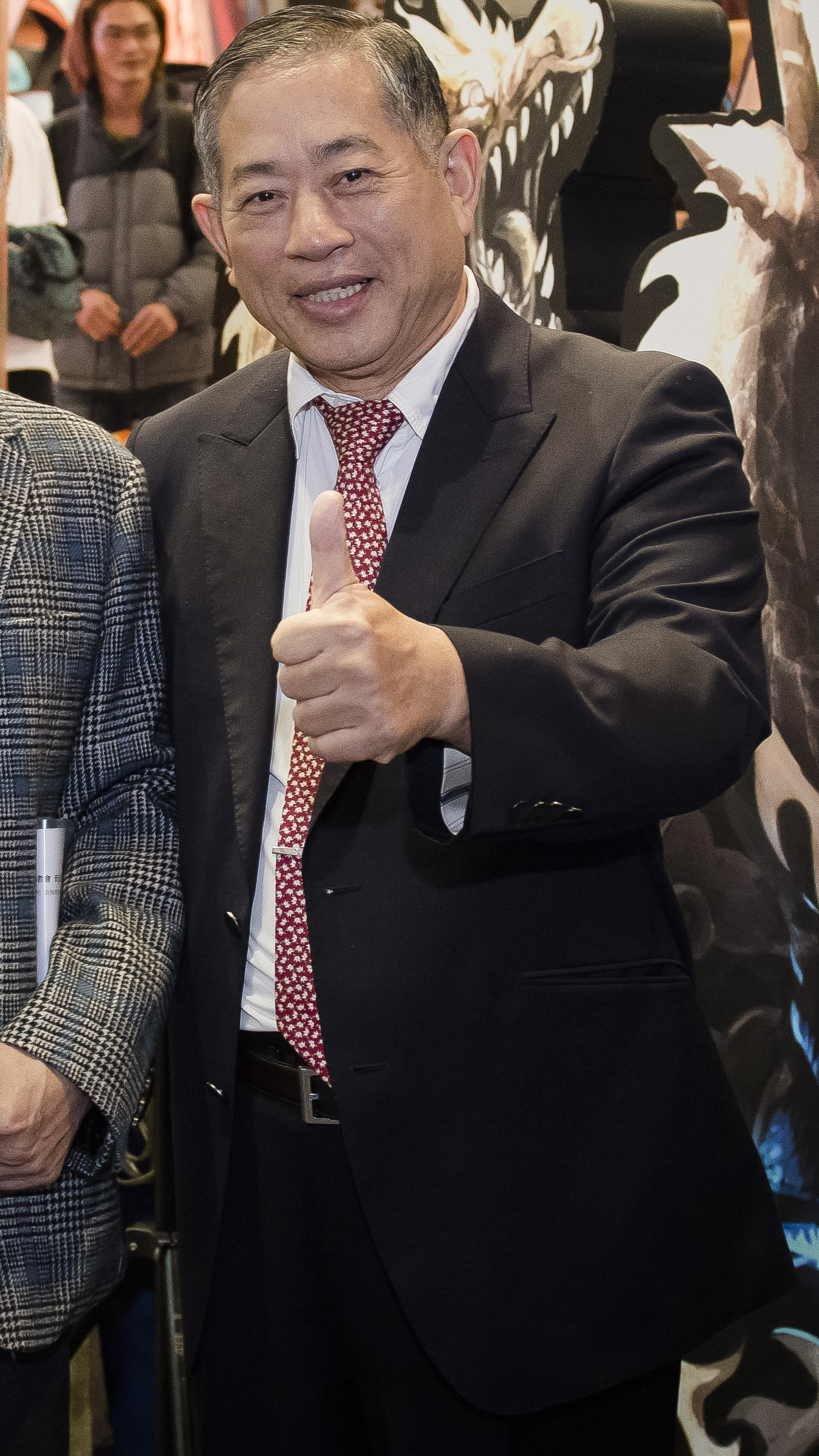 2015台北國際電玩展，智冠科技董事長王俊博出席智樂堂網路萬人線上遊戲《刀龍傳說Online》上市記者會。